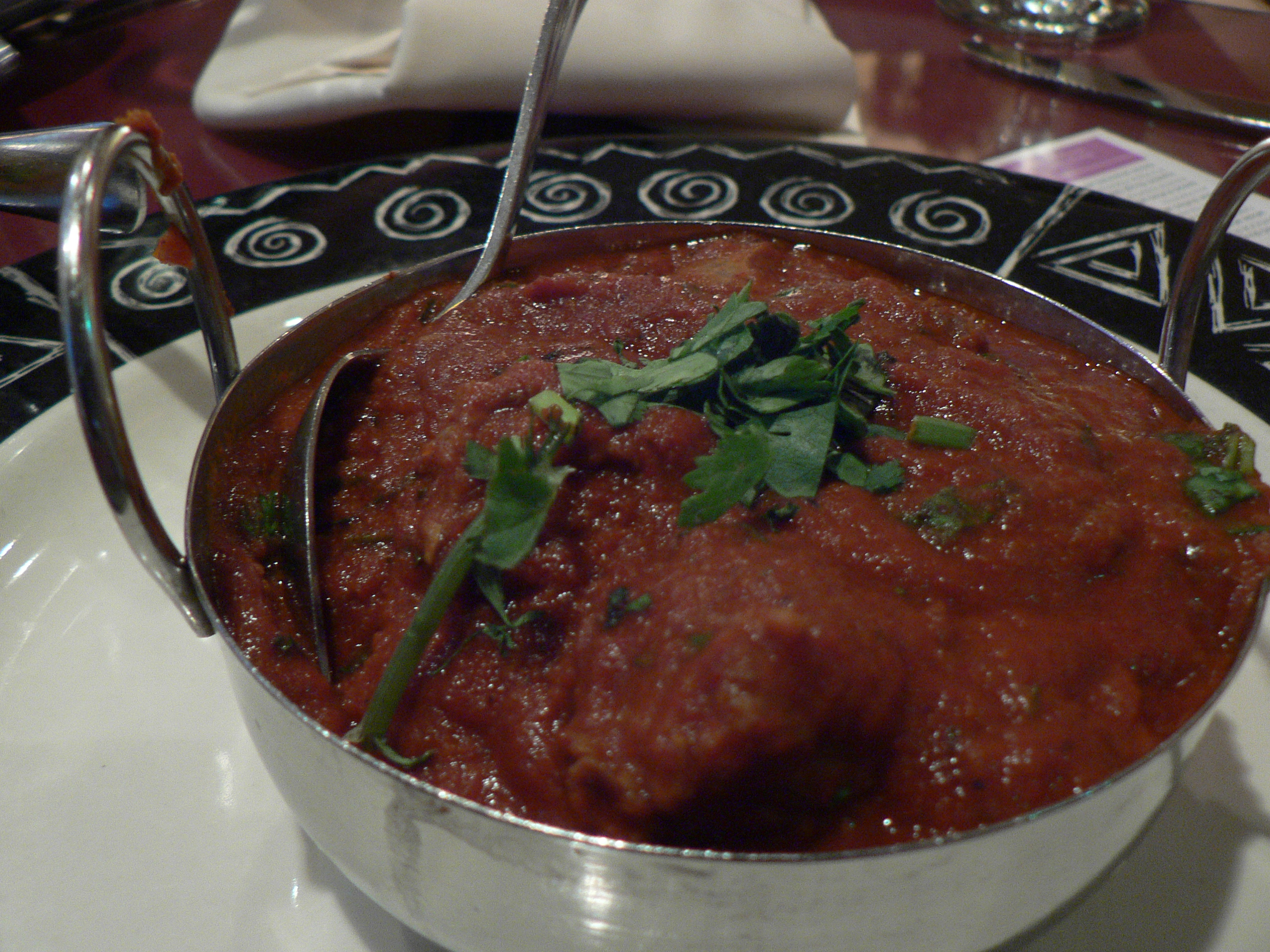 Lamb or goat dish